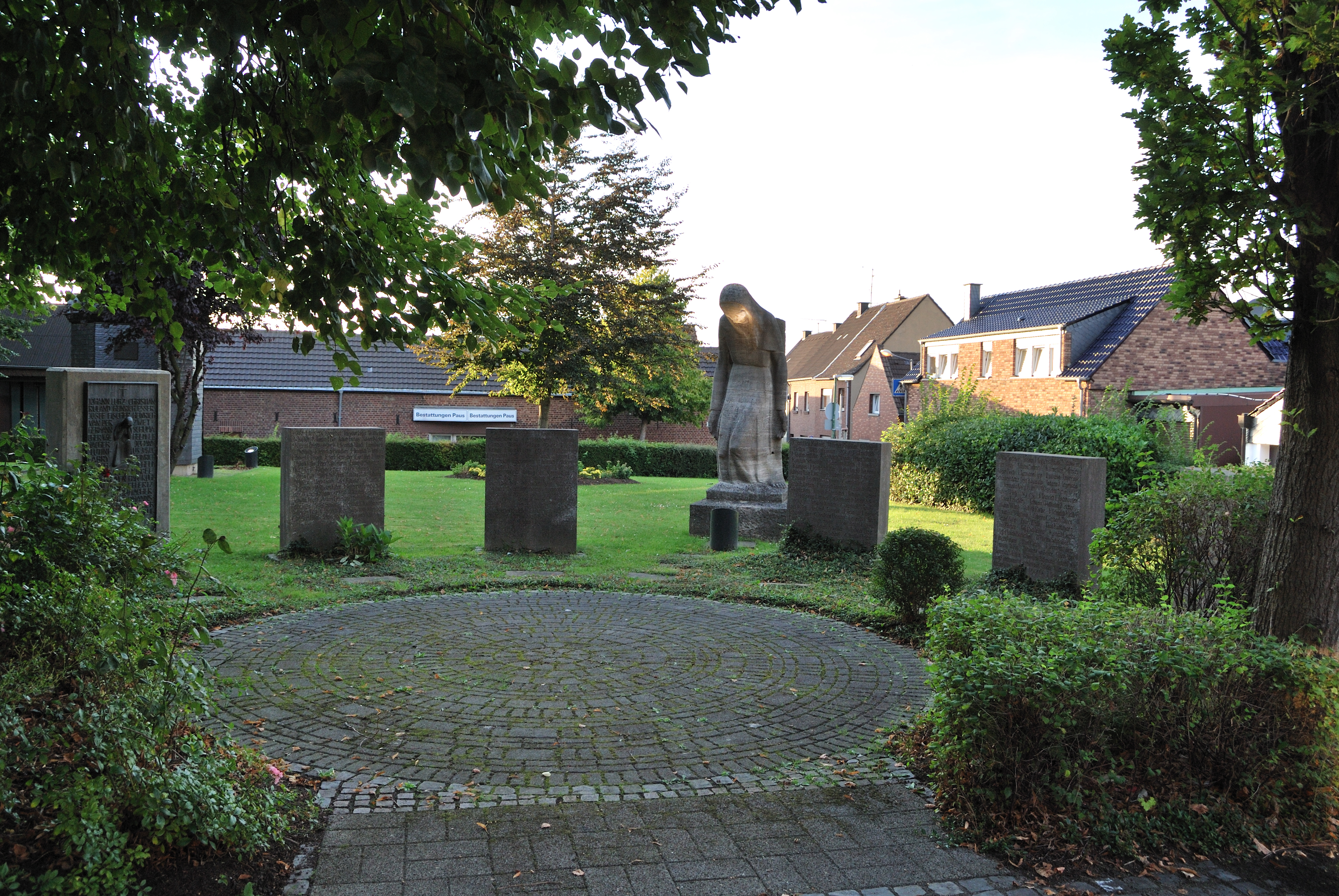 Denkmalnummer 236